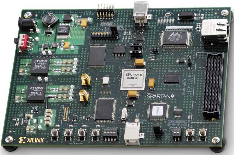 Xilinx S6-SP601 board